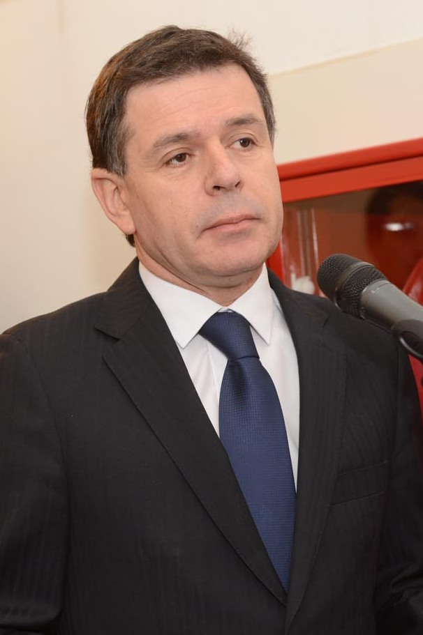 Ceremonia en homenaje al ex subsecretario de la Secretaria General de Gobierno del Presidente Salvador Allende, Arsenio Pupin.